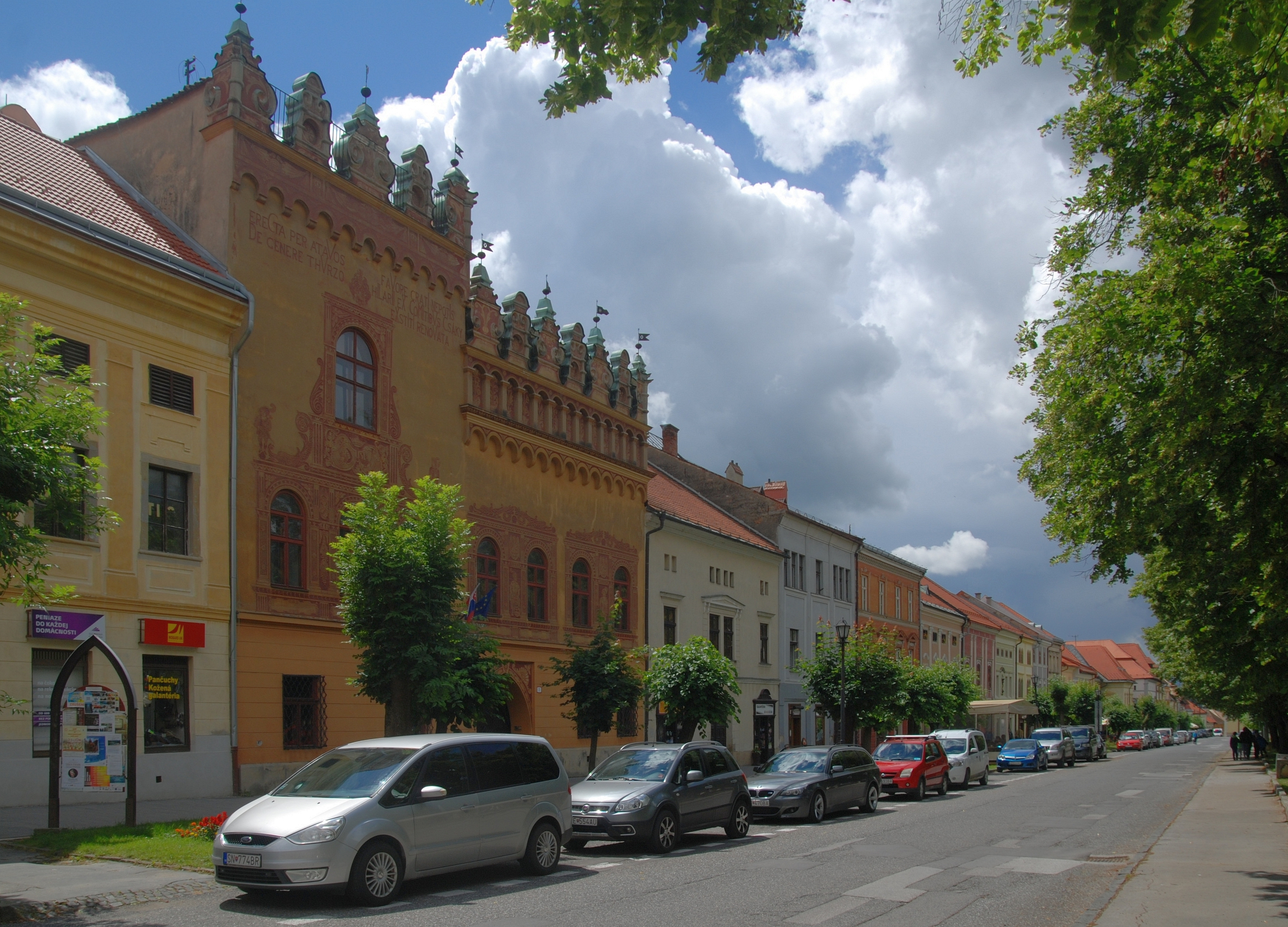 miasto Levoča